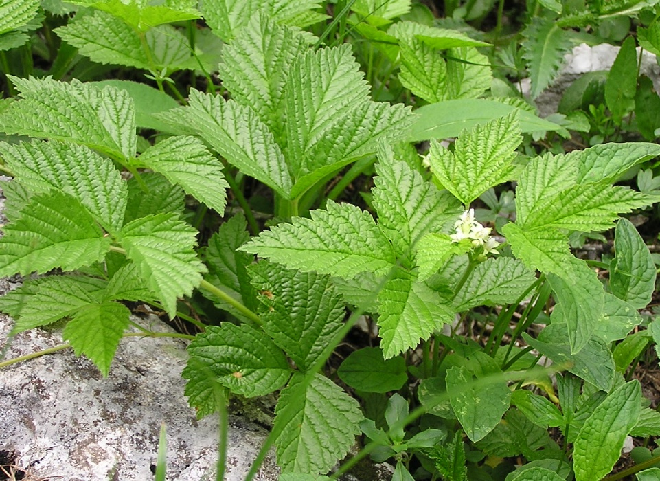 Rubus saxatilis, aufgenommen am Krippenstein (Dachsteinmassif, Österreich).